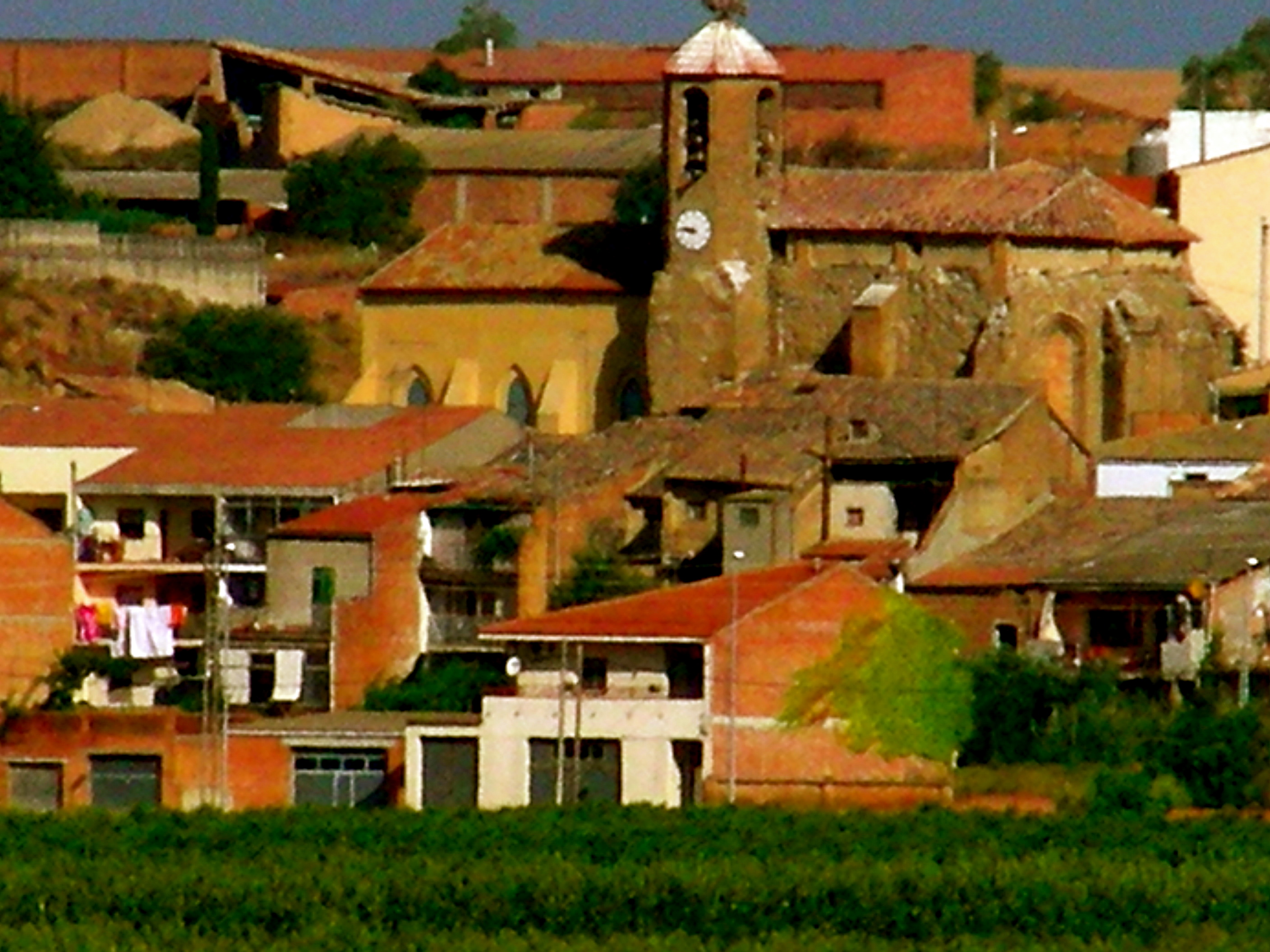 aquesta és una de tantes imatges que s'han prés del meu estimat poble de Menàrguens. Menàrguens. Lleida.